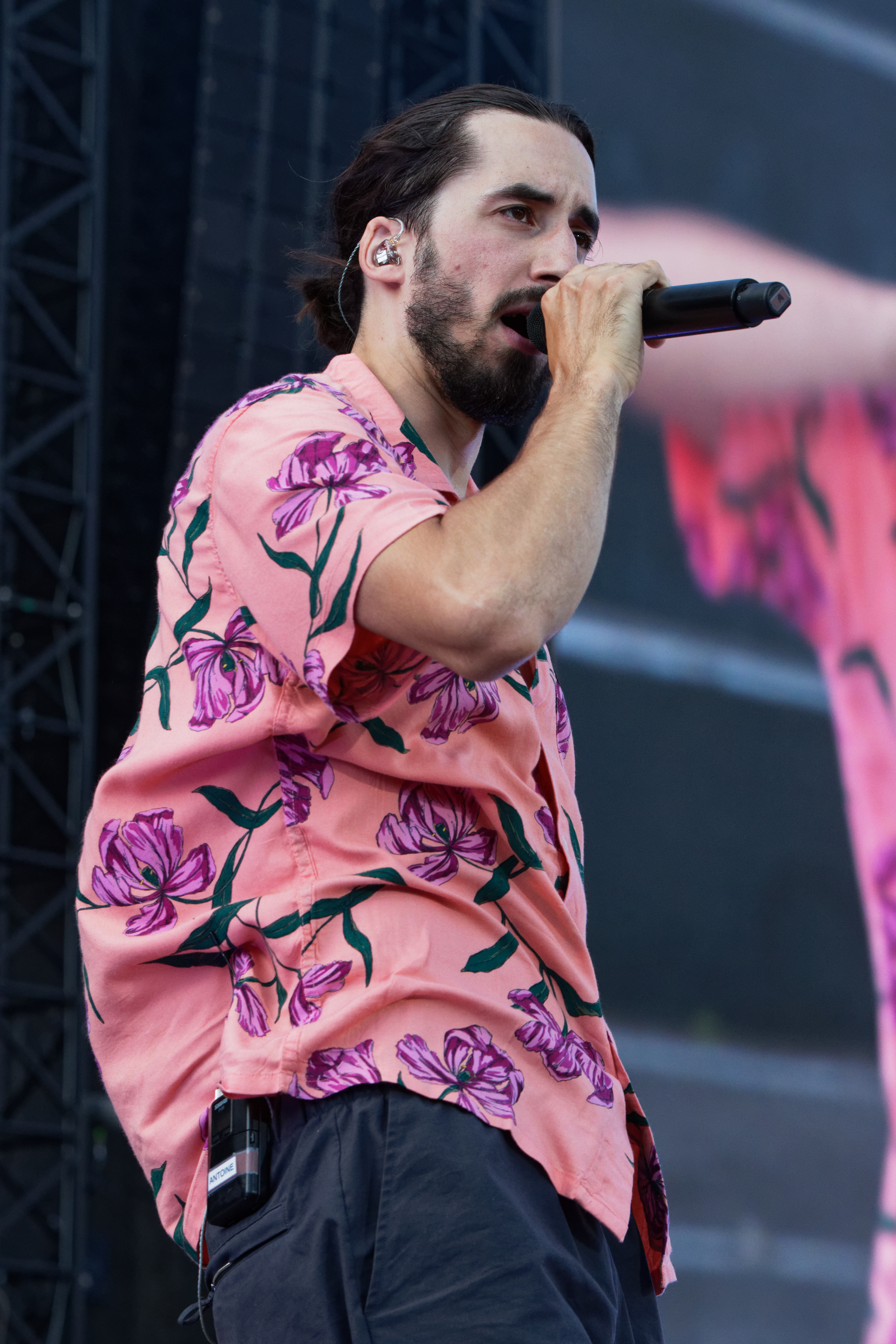 Lomepal en concert lors du festival des vieilles charrues 2019.